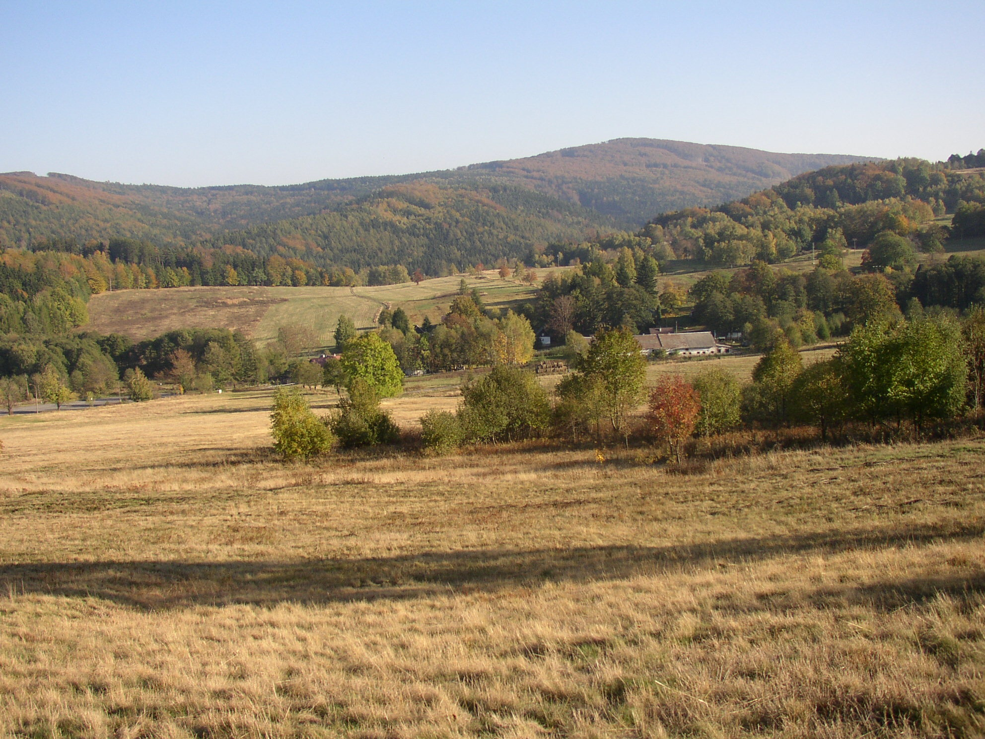 Pěnkavčí vrch (dt. Finkenkoppe) vom Křížová hora (dt. Kreuzberg) bei Jiřetín pod Jedlovou. Lausitzer Gebirge, Nordböhmen, Tschechien. Česky: Pěnkavčí vrch, podlhed z Křížové hory